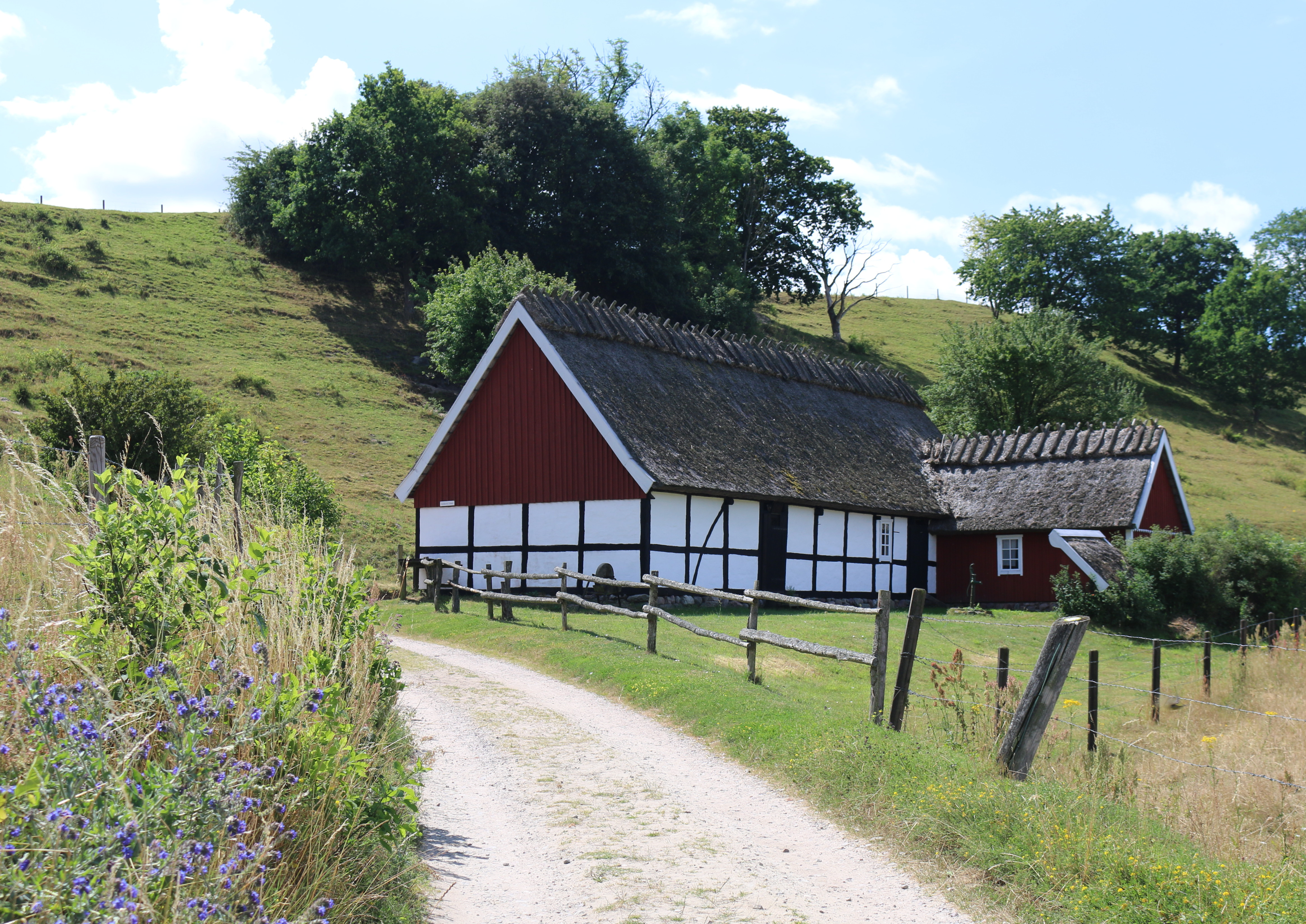 Lindgrens länga, Haväng